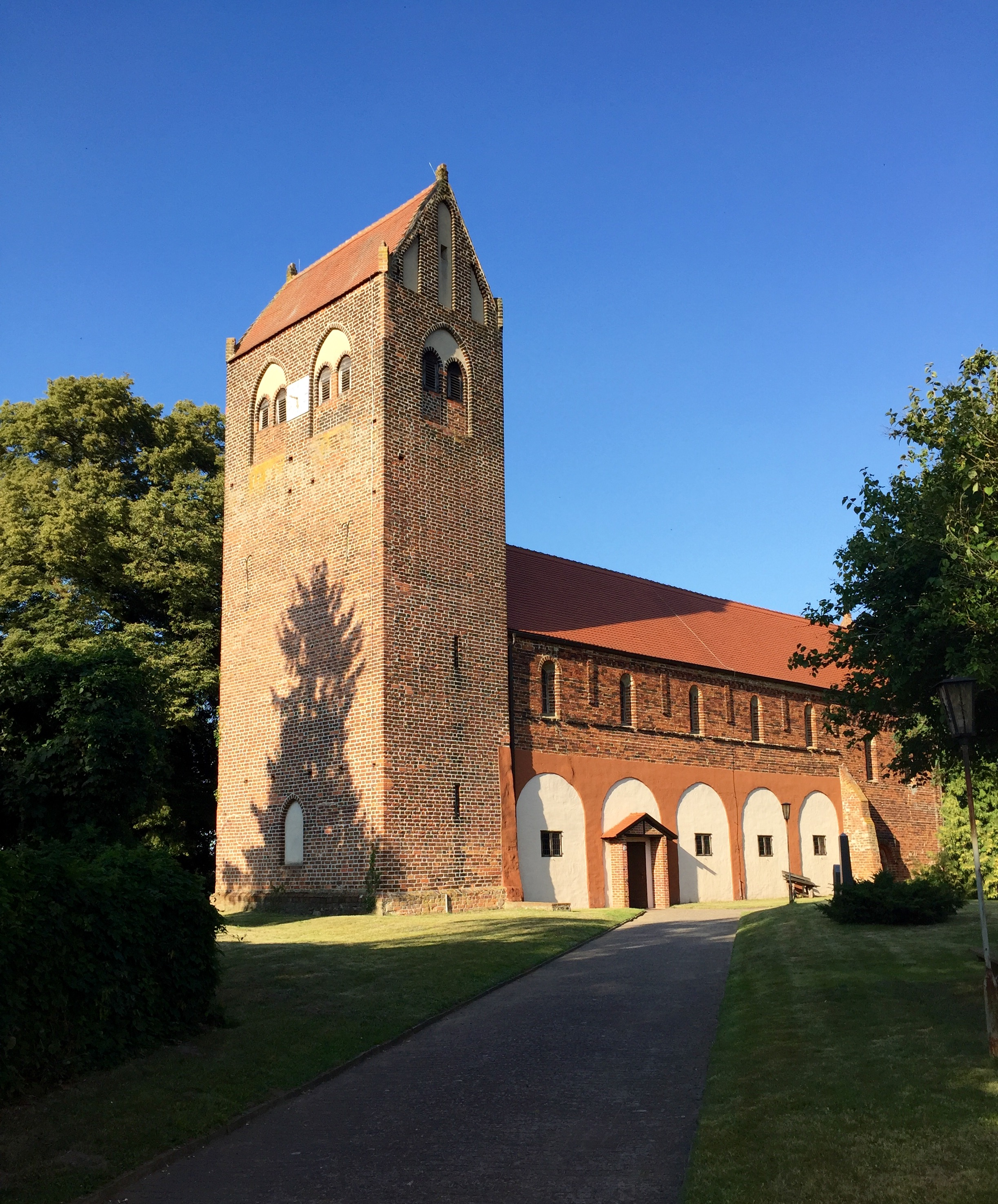 Kirche in Königsmark 2016